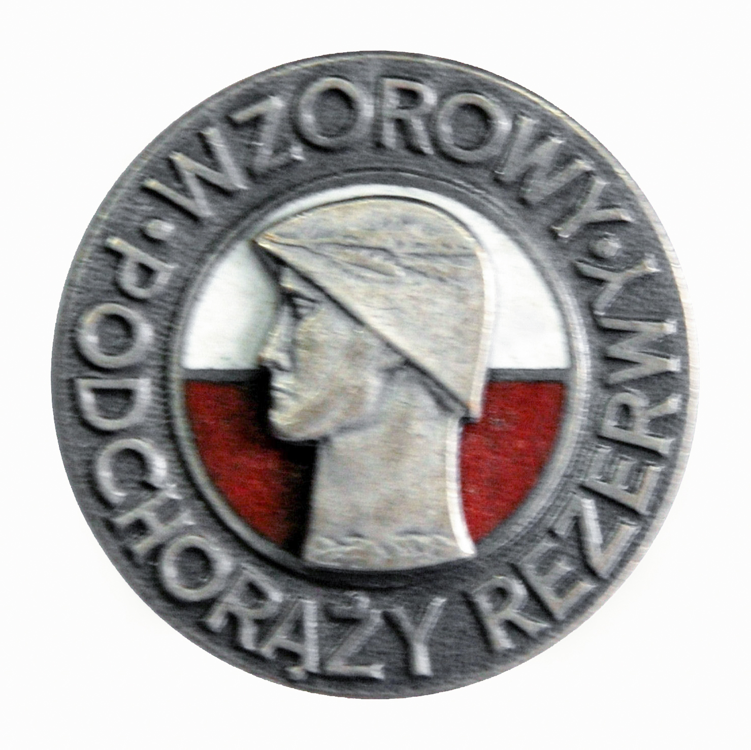 Odznaka Wzorowego Podchorążego - srebrna